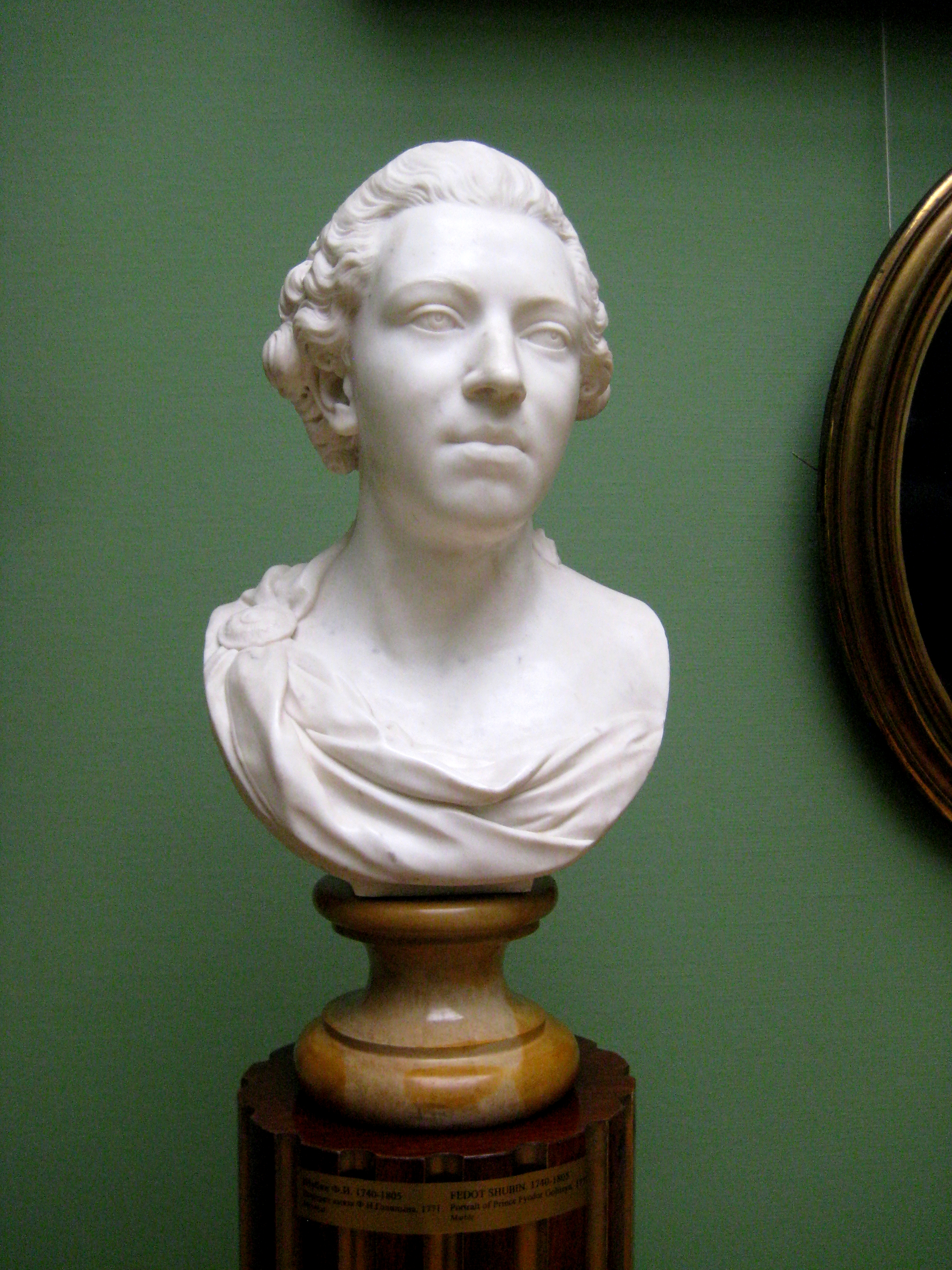 Портрет князя Ф.Н. Голицына. Бюст работы Ф. Шубина. 1771. ГТГ